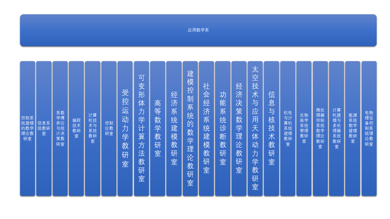 中文（中国大陆）: 圣彼得堡国立大学应用数学与过程控制系结构图